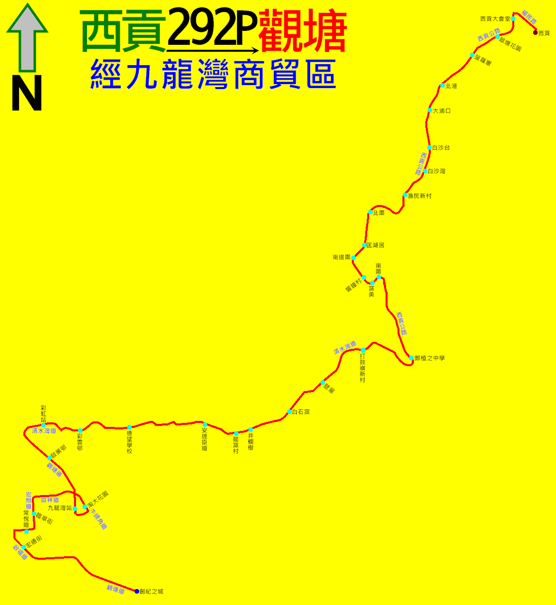 中文（香港）: 九巴292P線的走線圖